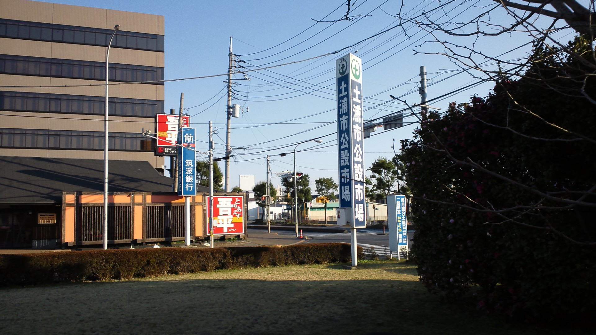 土浦市卸町